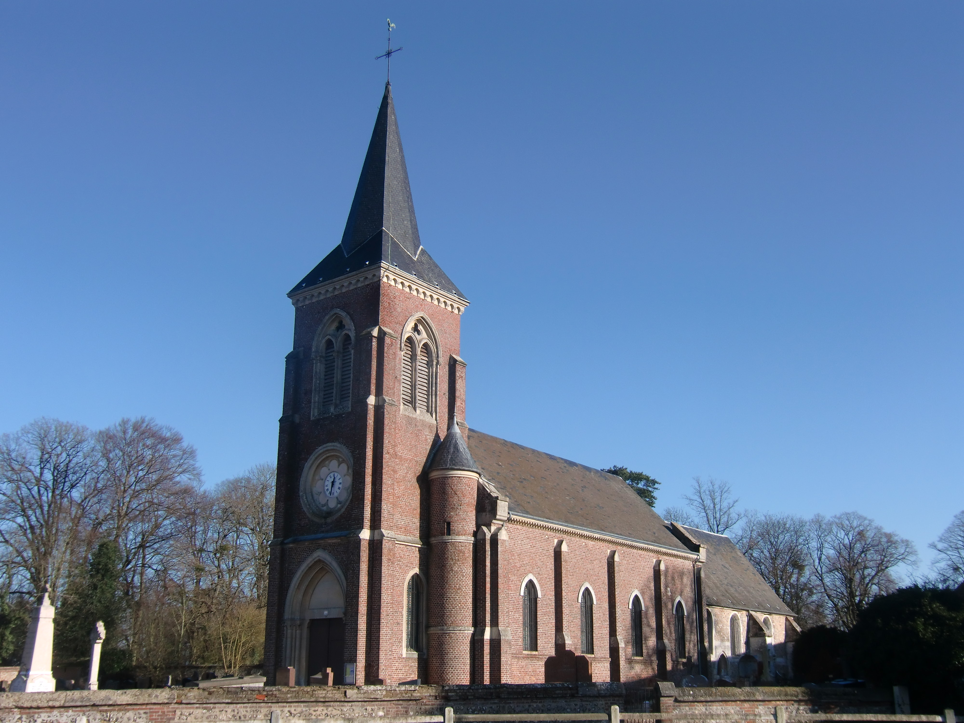 Église Saint-Martin de Bosgouet (Eure, Normandie, France)